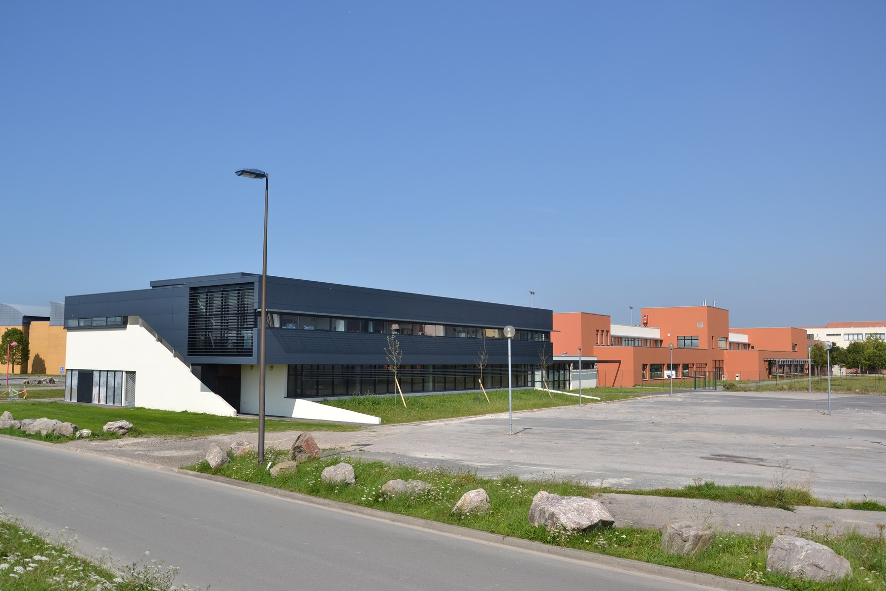 Université du Littoral Côte d'Opale - Nouveaux Laboratoires. Au fond, le CUEEP.